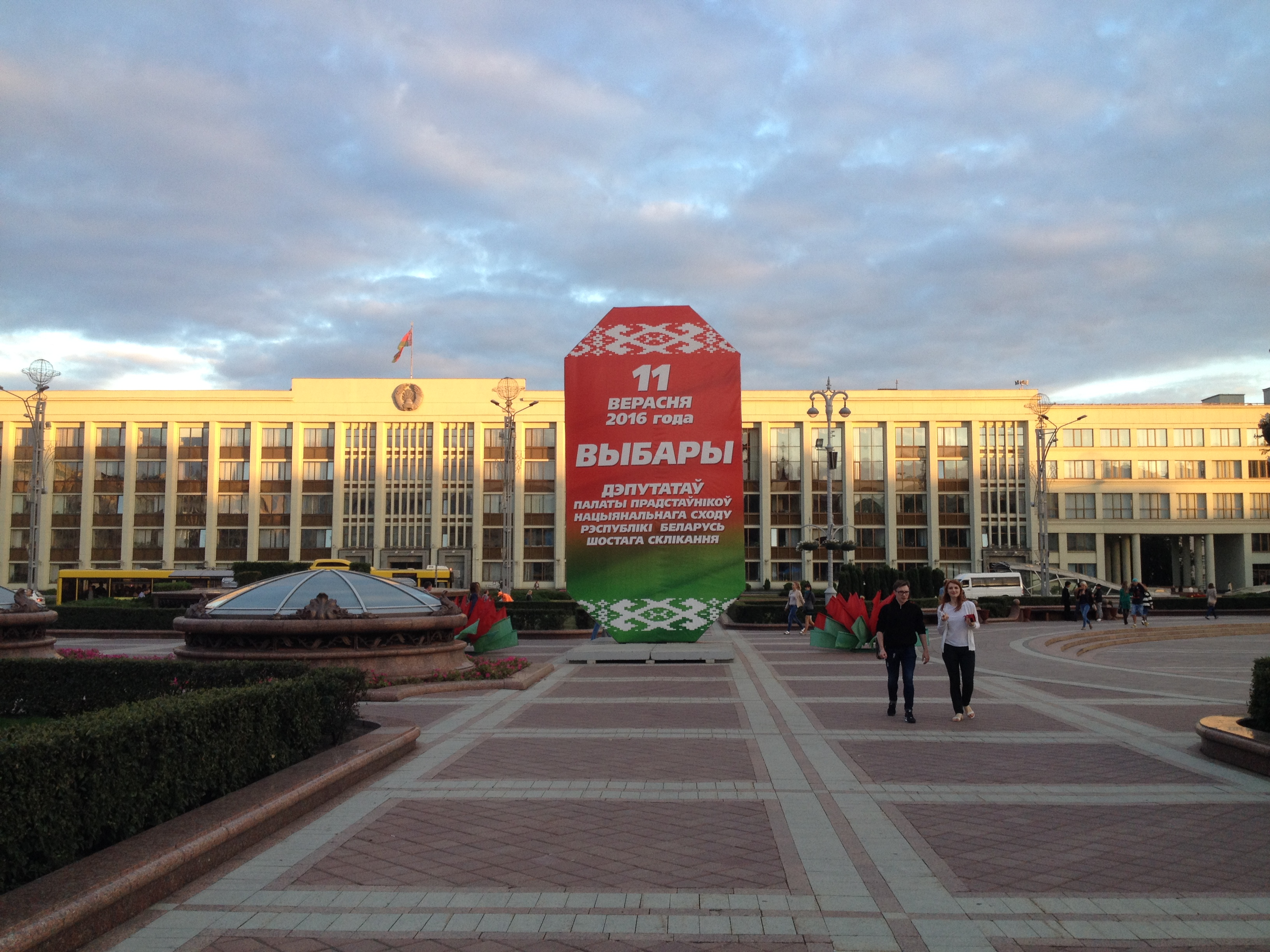 Plac Niezależności w Mińsku.